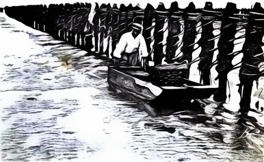 acon